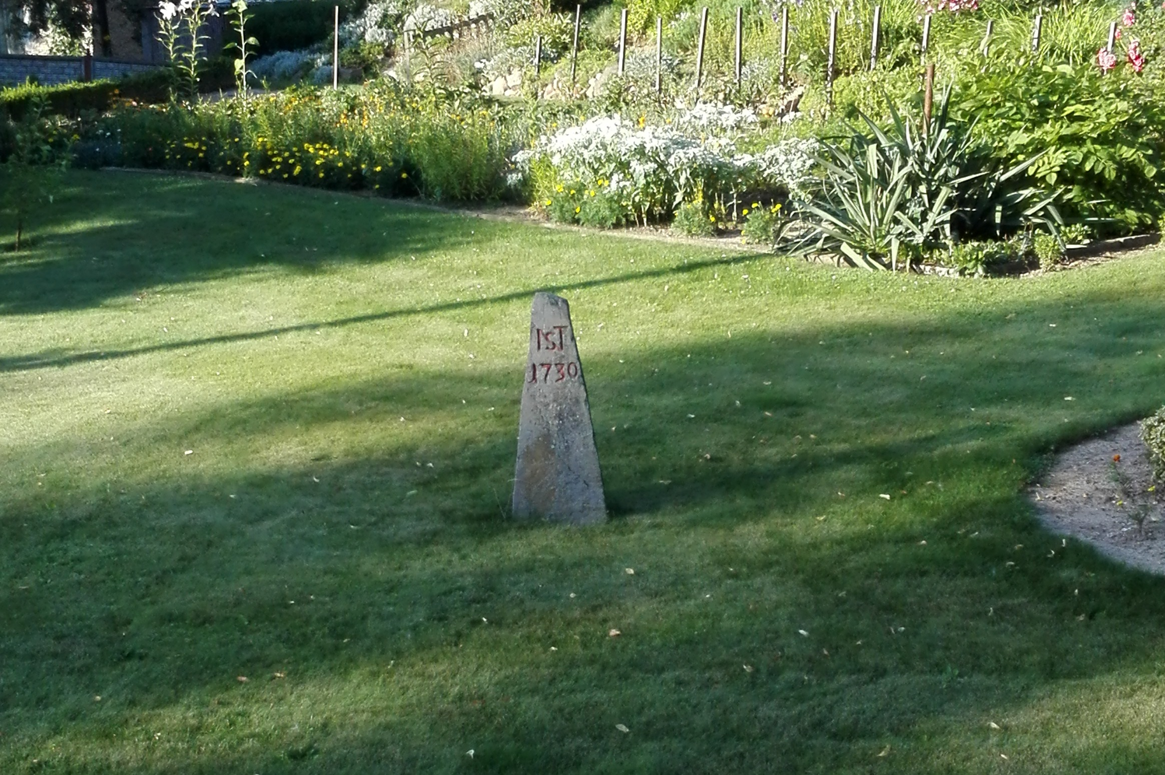 Krzyżkowice, kamień graniczny Królewskiego Miasta Prudnika z 1730 roku